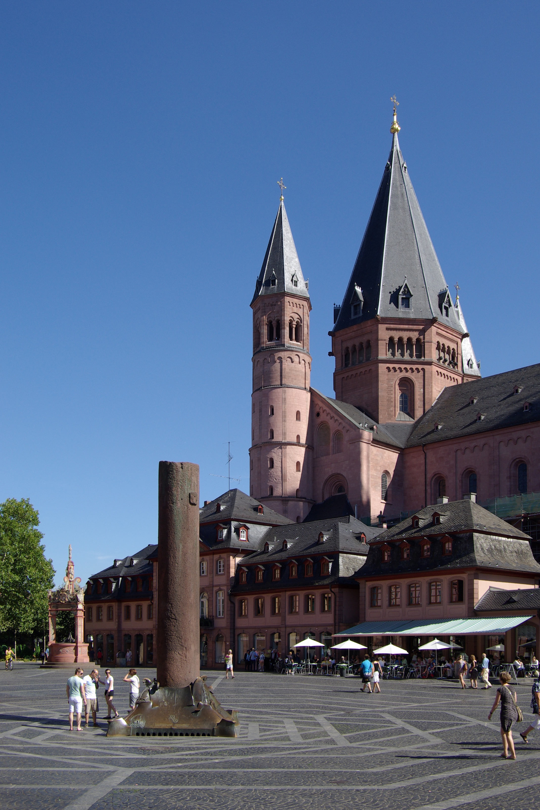 Mainz, Dom, Domplatz mit Heunensäule